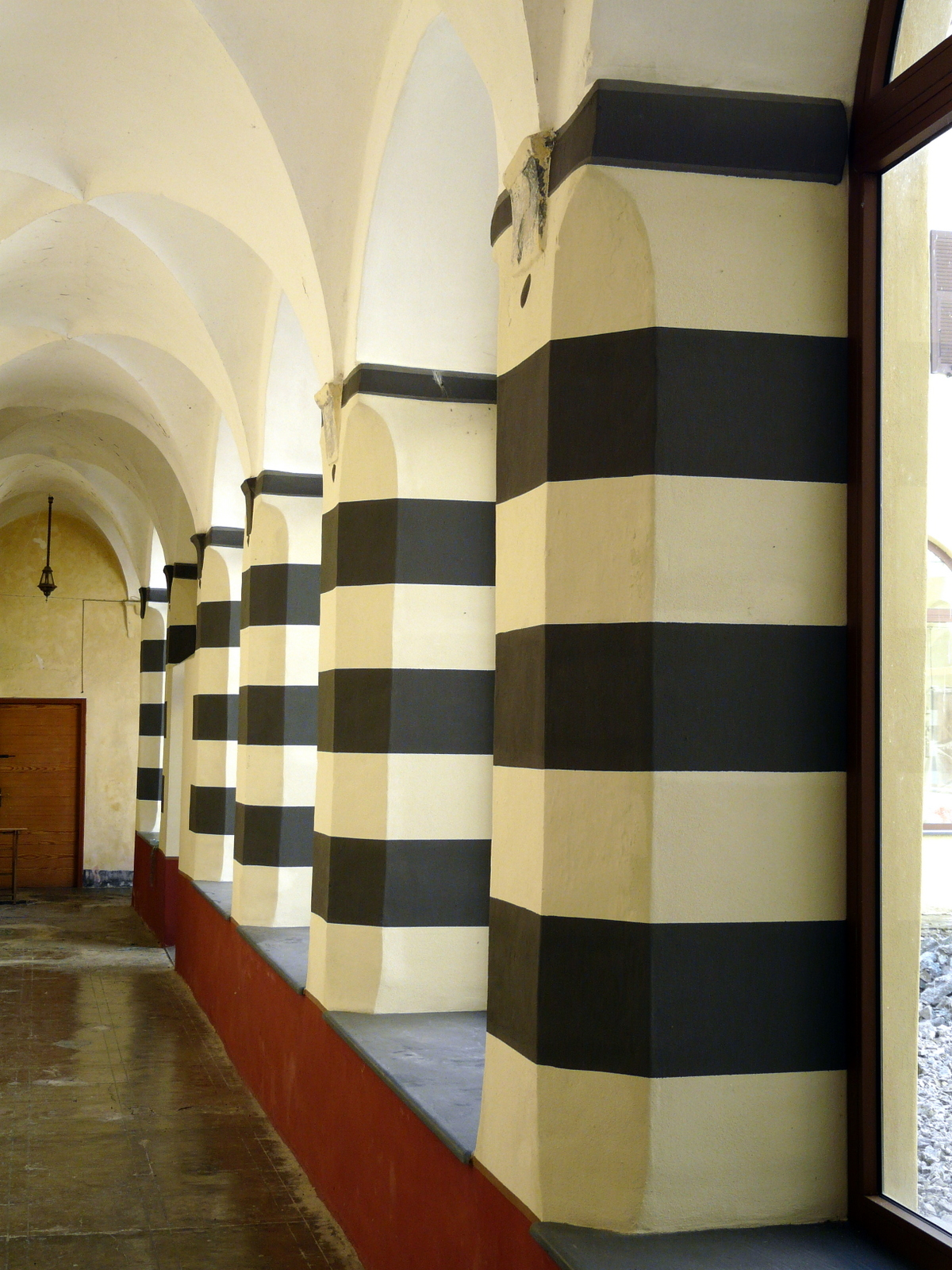 Il chiostro interno del convento annesso al santuario di Nostra Signora di Montebruno, Montebruno, Liguria, Italia